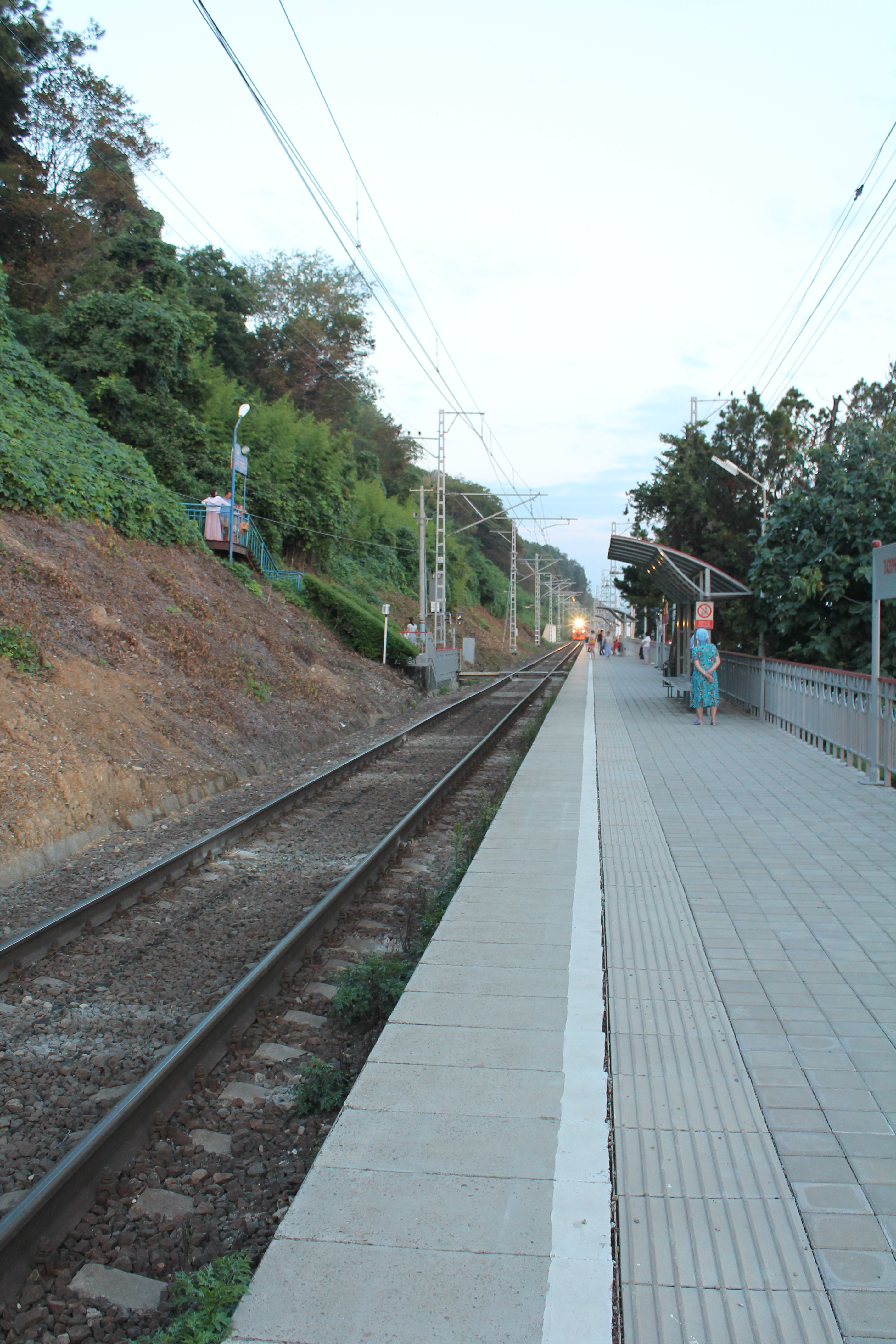 Платформа Лазурный берег (линия Туапсе-Сочи)